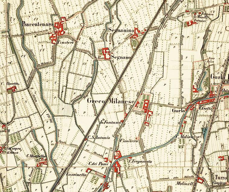 Frammenti della carta di manovra del nord Milano dell'IGM